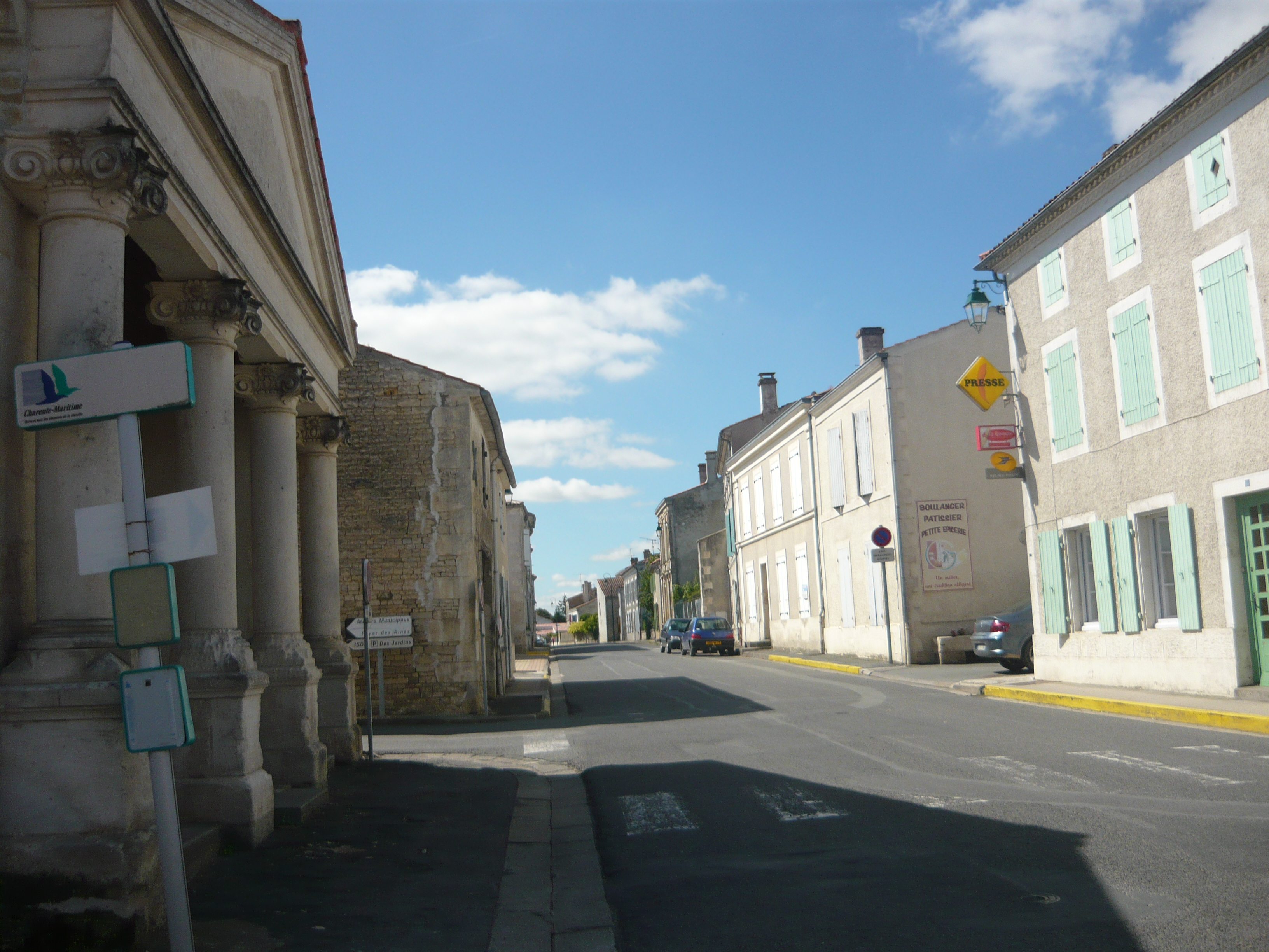 La rue principale à Saint-Georges-du-Bois en Charente-Maritime photo prise à l'angle de la rue de la mairie et du Panthéon.